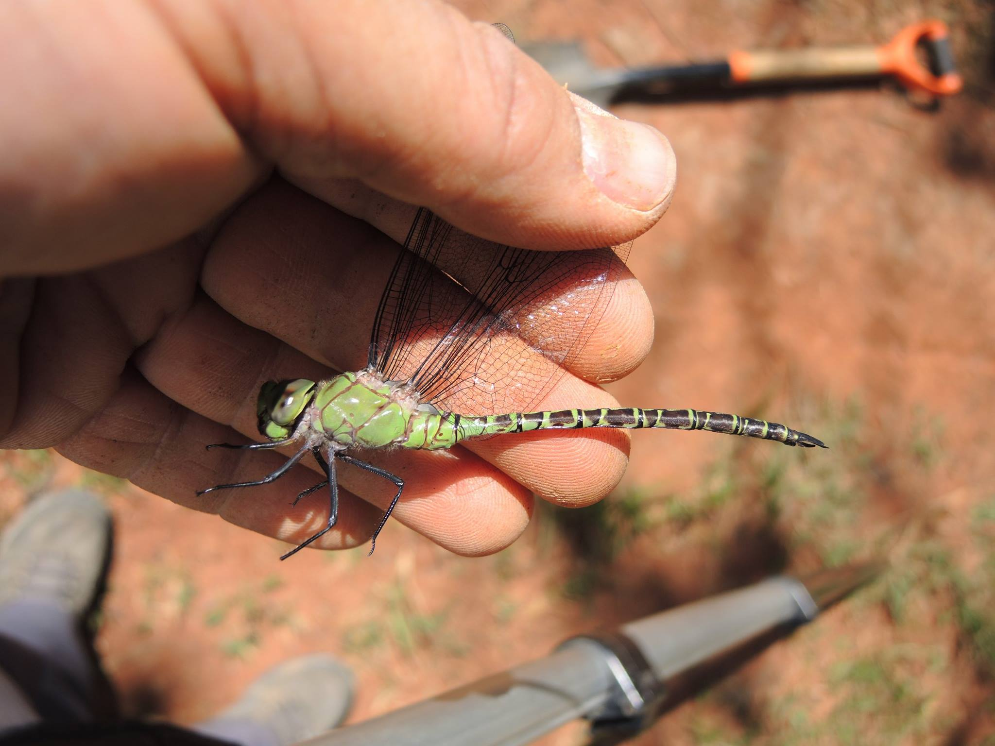 Coryphaeschna viriditas male (not a female!)